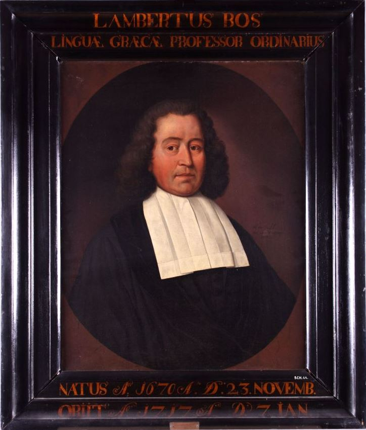 Portret in olieverf van van Lambertus Bos, professor Grieks aan de Franeker universiteit van 1704 tot 1717. Bos is afgebeeld in een toga met een bef en hij heeft halflang donkergrijs haar. Het portret is geschilderd in een beigebruin ovaal. Lambertus Bos (Workum 23 november 1670 - Franeker 6 januari 1717) had al een bloeiende loopbaan als huisonderwijzer toen hij -als wat oudere student- talen ging studeren in Franeker. In 1704 kon hij Nicolaas Blancardus opvolgen als hoogleraar Grieks. (tekst Museum Martena)